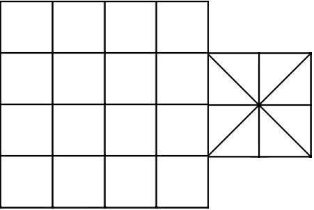 虎棋棋盤的一種。